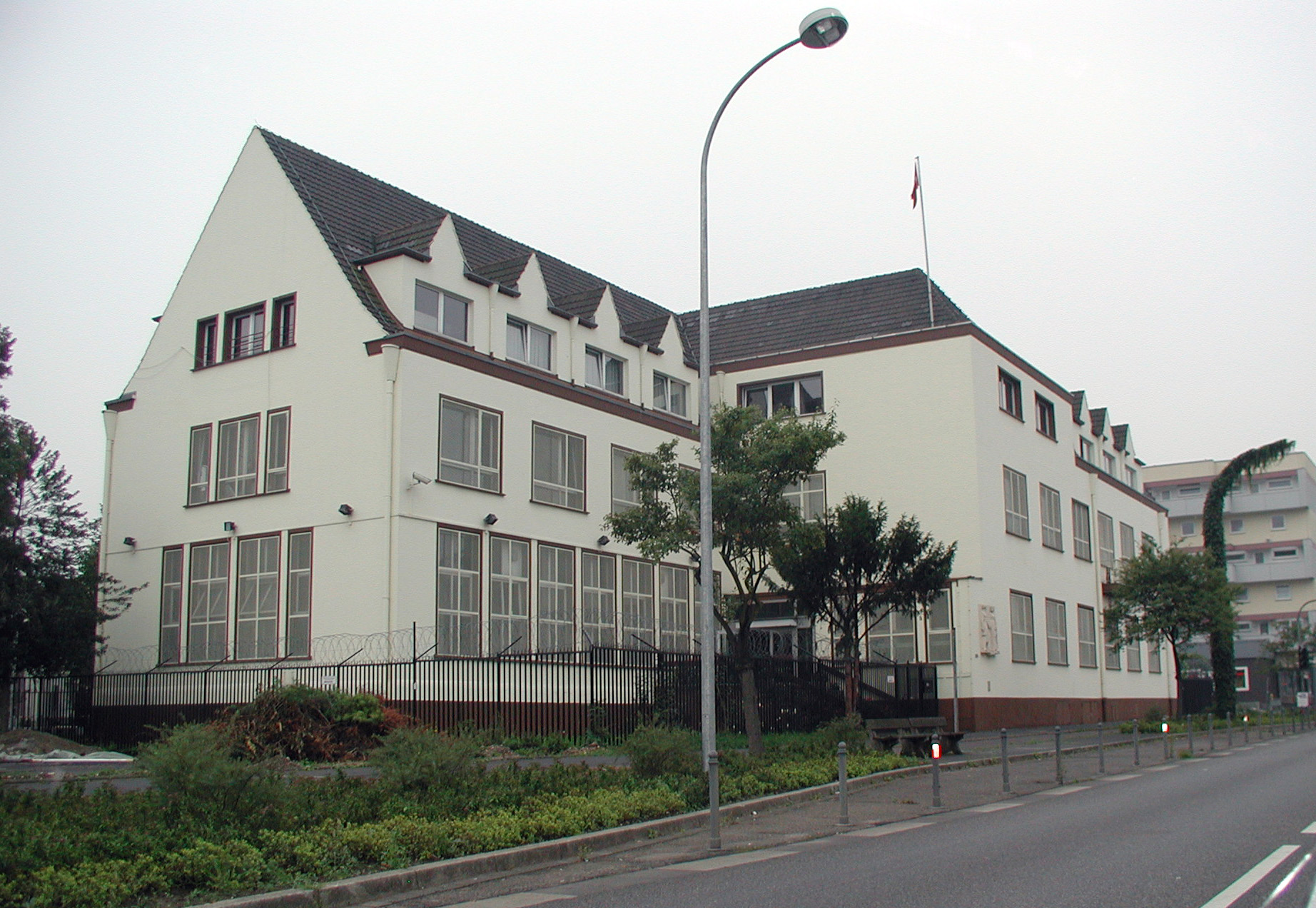 Generalkonsulat der Republik Türkei, Luxemburger Straße 285, Hürth-Hermülheim